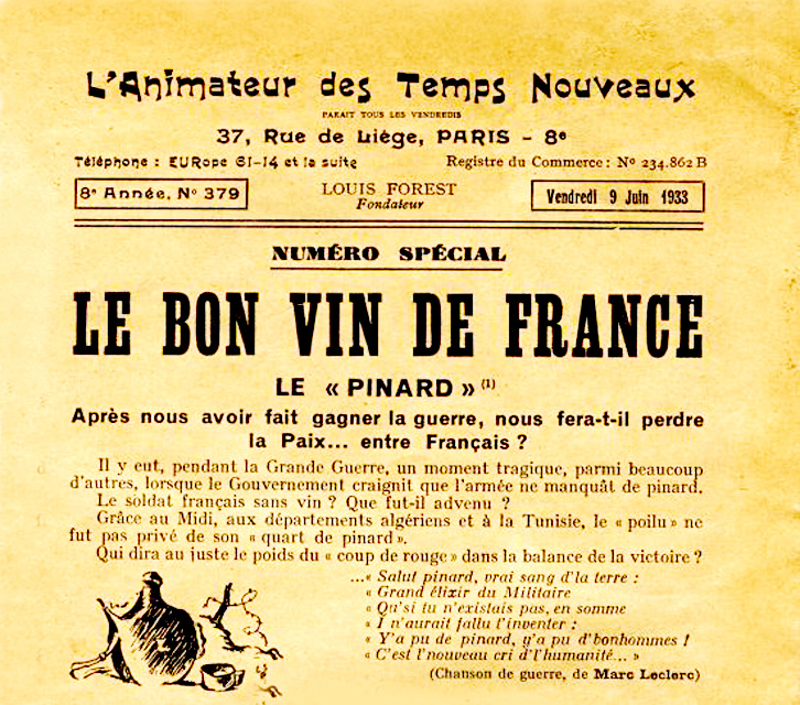 Le bon vin de France